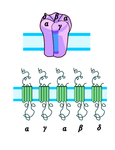 nicotinischer ACh-Rezeptor. selbst gezeichnet